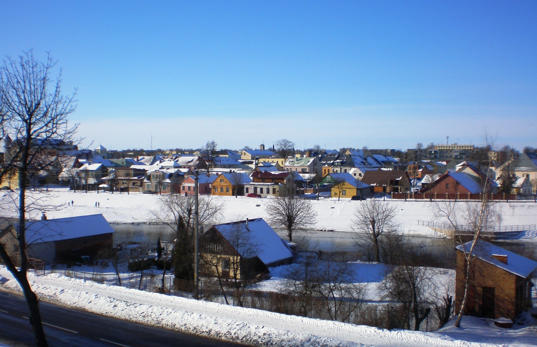 Kėdainių senamiestis nuo Šv. Jurgio bažnyčios